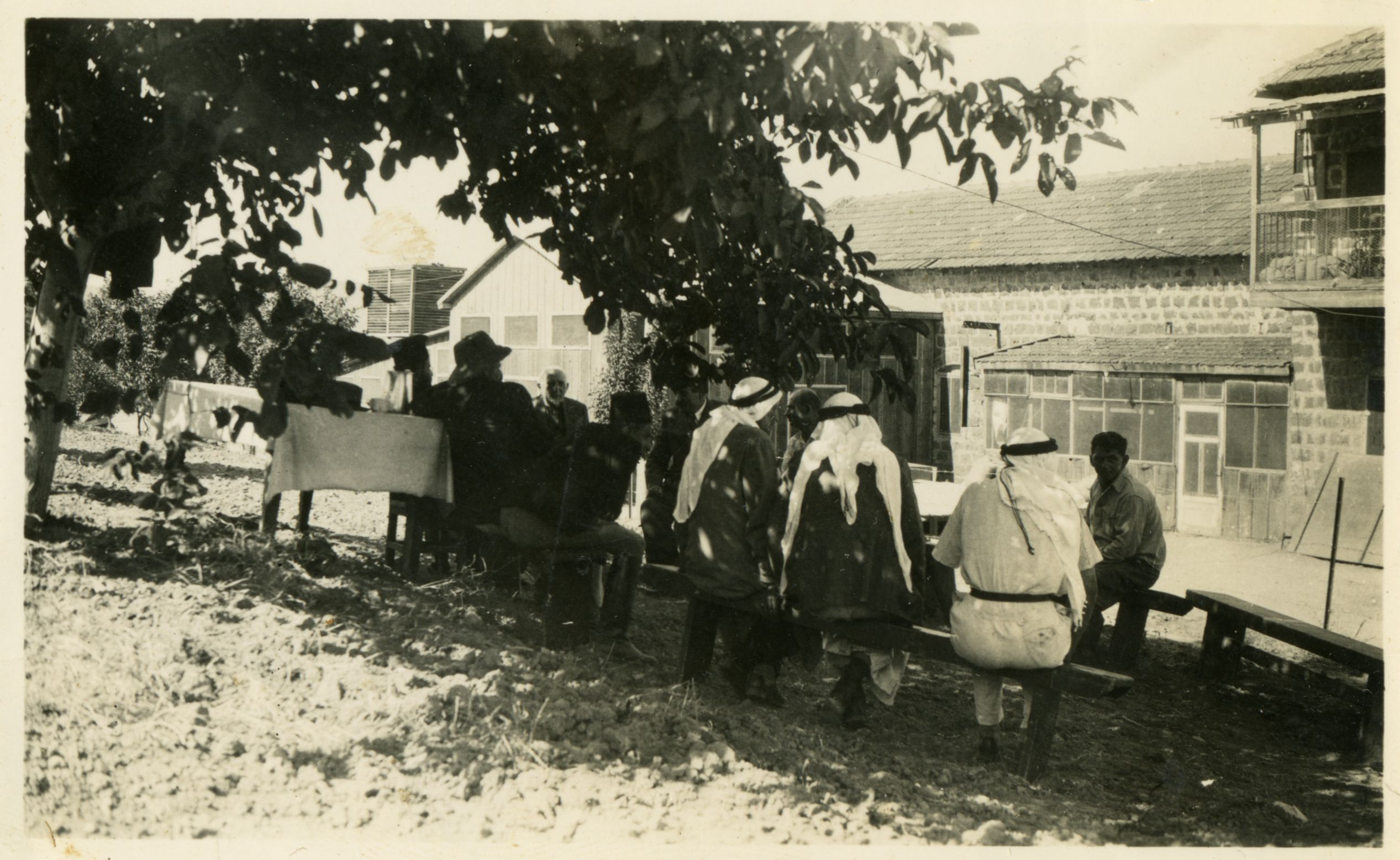 חיים מרגליות קלווריסקי ביום הולדתו ה- 70 באיילת השחר.